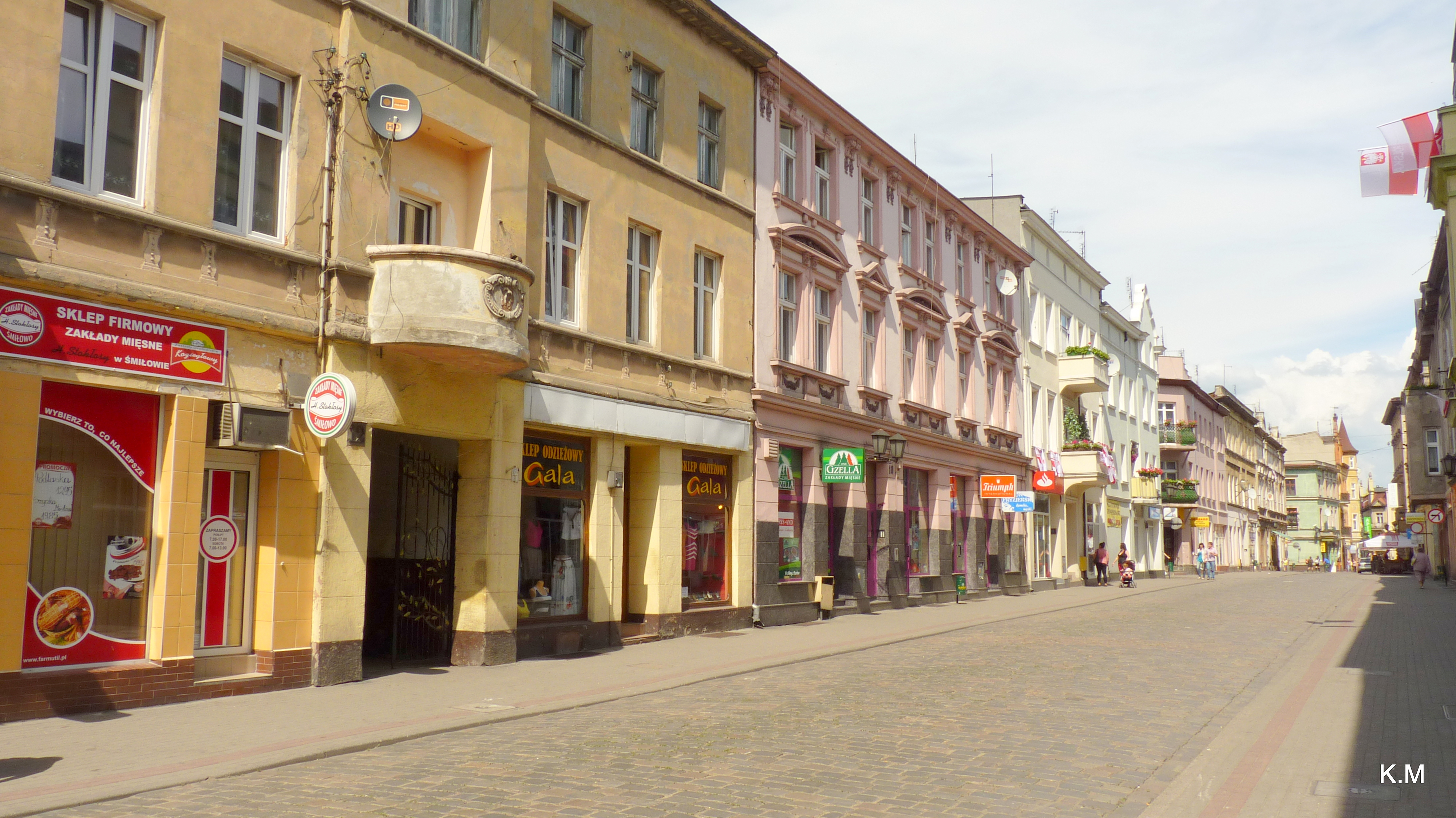 Chełmża - ulica Mikołaja Kopernika.